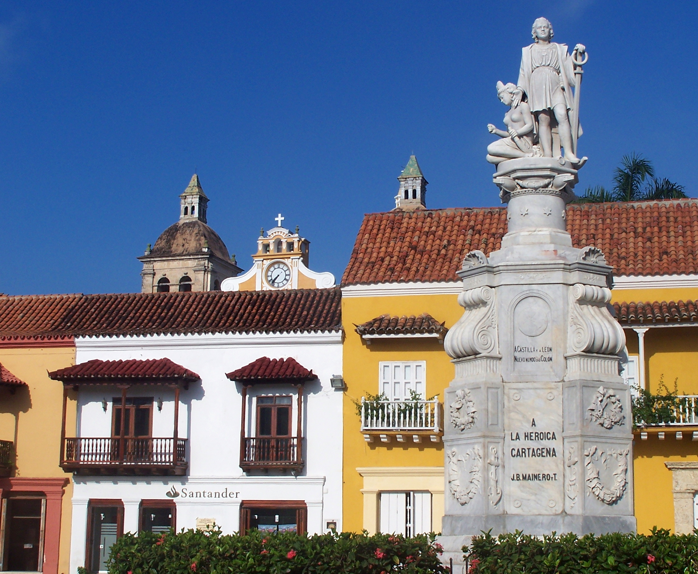 Plaza de la Aduana, Cartagena, Colombia